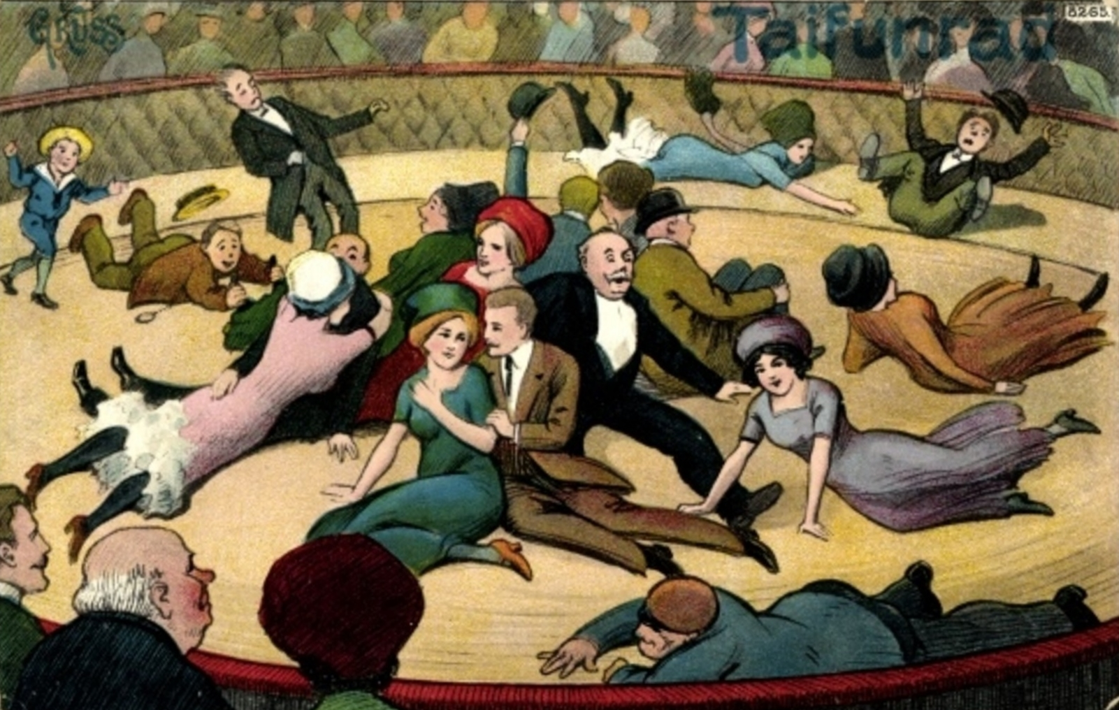 Jahrmarktbbesucher auf einer Drehscheibe, alte Ansichtskarte, gelaufen 1913, Verlag B. B. & O. L. G. m. b. H.